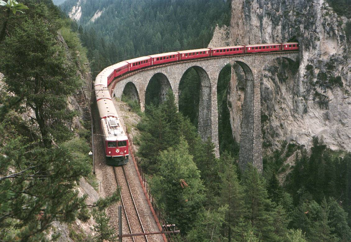 Die Ge 6/6 II 706 der Rhätischen Bahn (RhB) auf dem Landwasserviadukt.